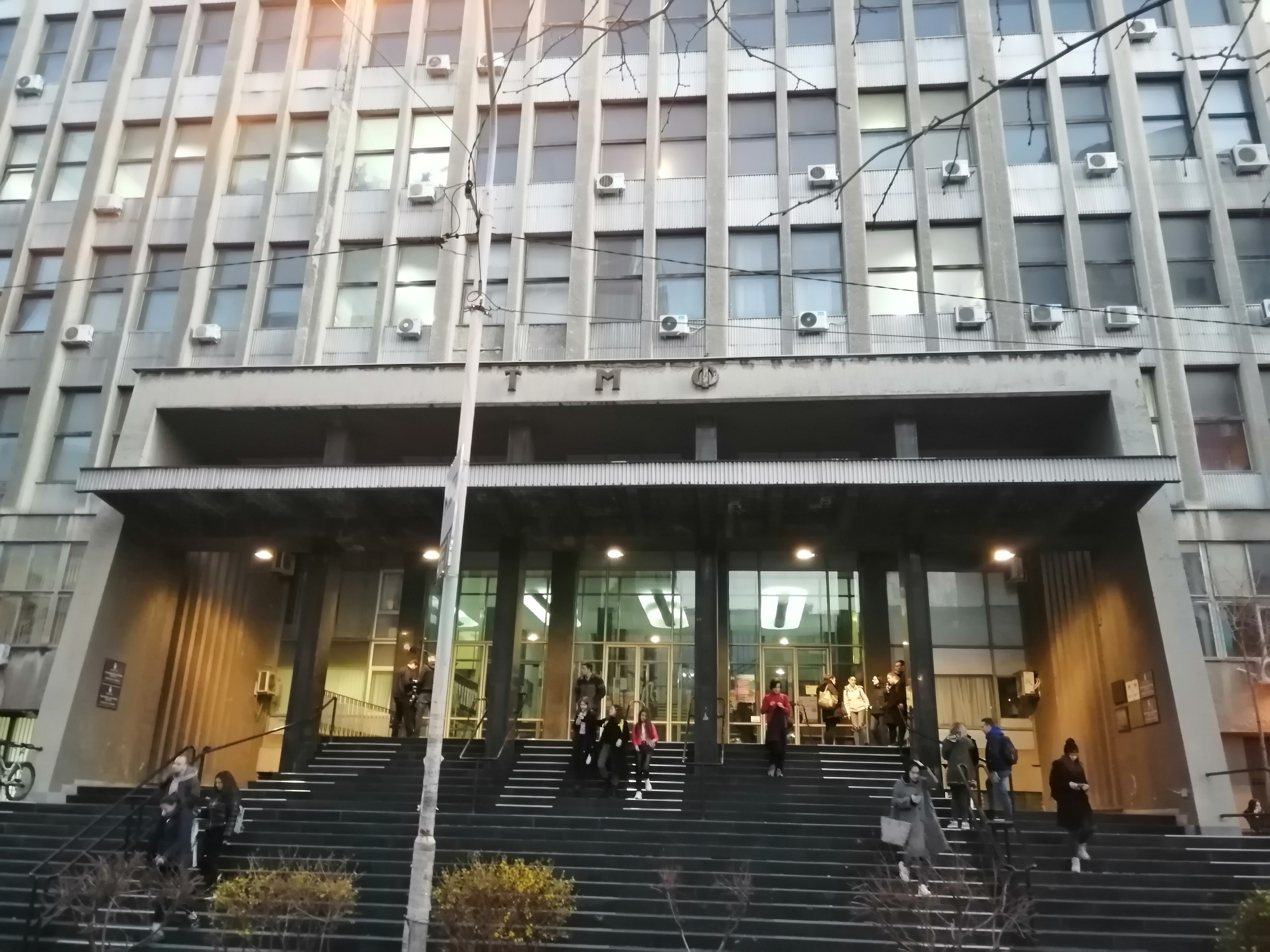 Srpski (latinica): TMF Beograd